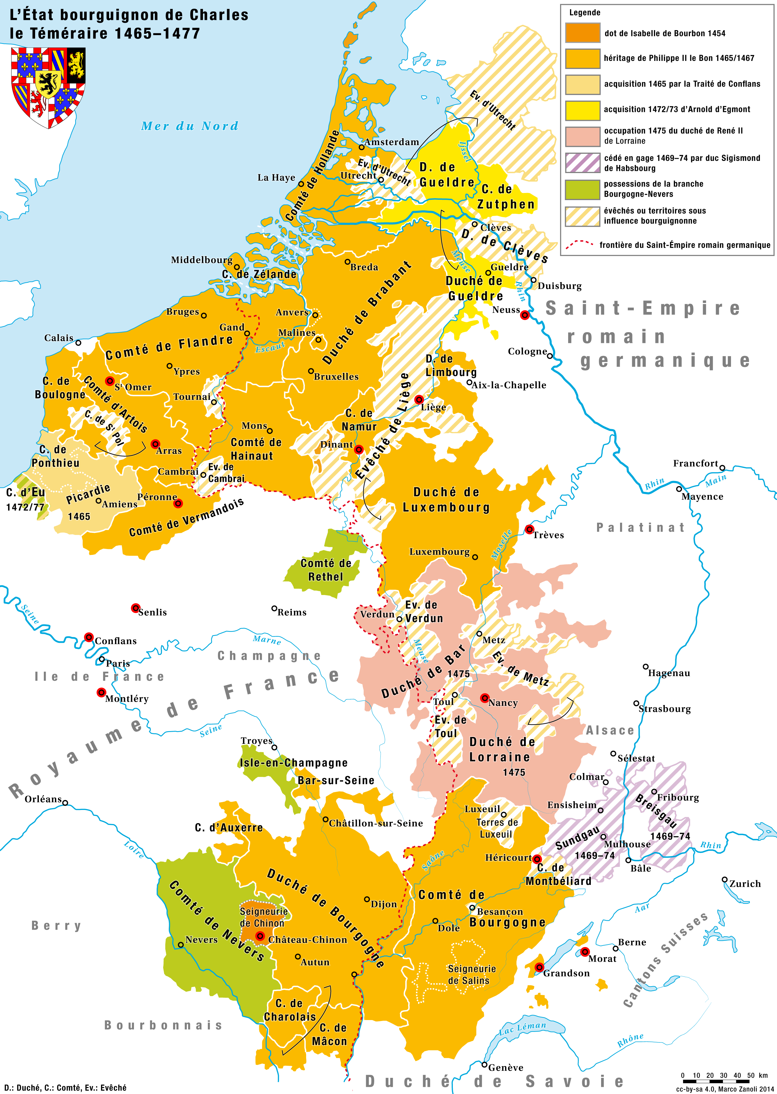 Das Herrschaftsgebiet des Hauses Burgund unter Karl I., dem Kühnen 1465/67–1477